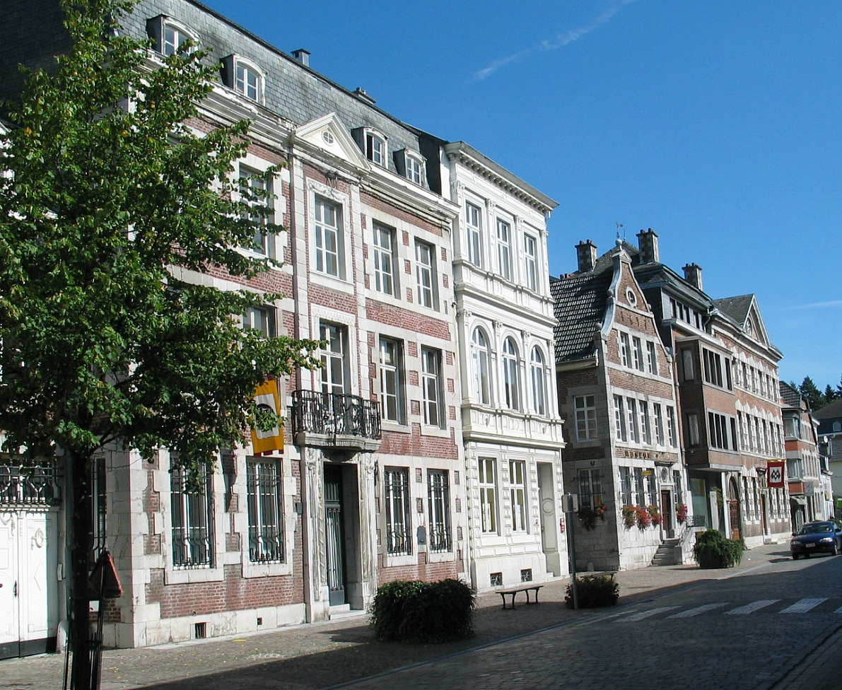 Sitz des Ministerpräsidenten der Deutschsprachigen Gemeinschaft in Eupen und der Euregio Maas-Rhein. Ehemaliges Kaufmannshaus in Eupen, Gospert 42, Architekt vermutlich Mefferdatis.